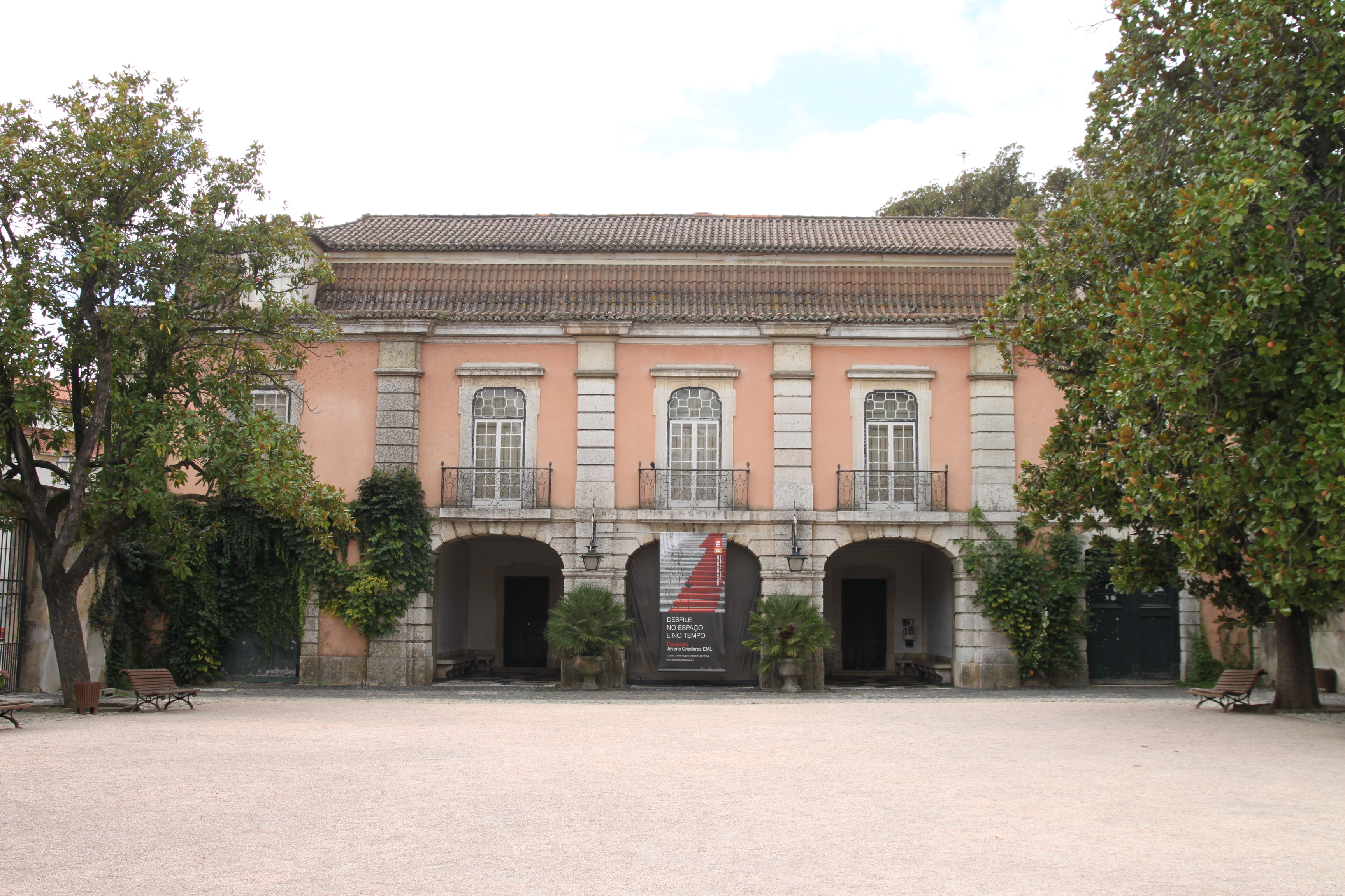 Palácio do Monteiro-Mor This file was uploaded for Wiki Loves Monuments in Portugal with the unique identifier 74720.